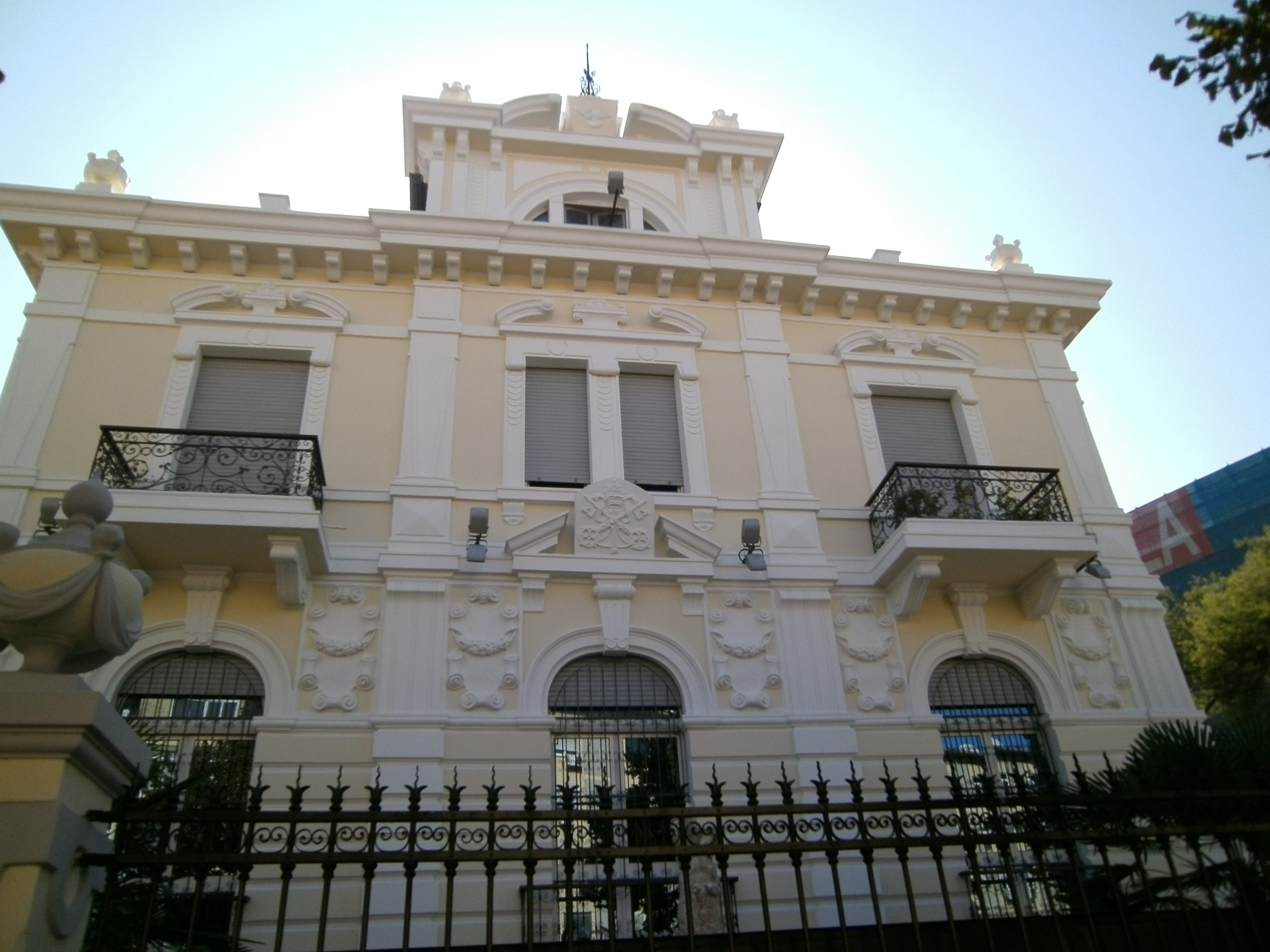 Ambasada e Vatikanit. Pamje e nderteses nga perpara, me gardhin rrethues te saj.